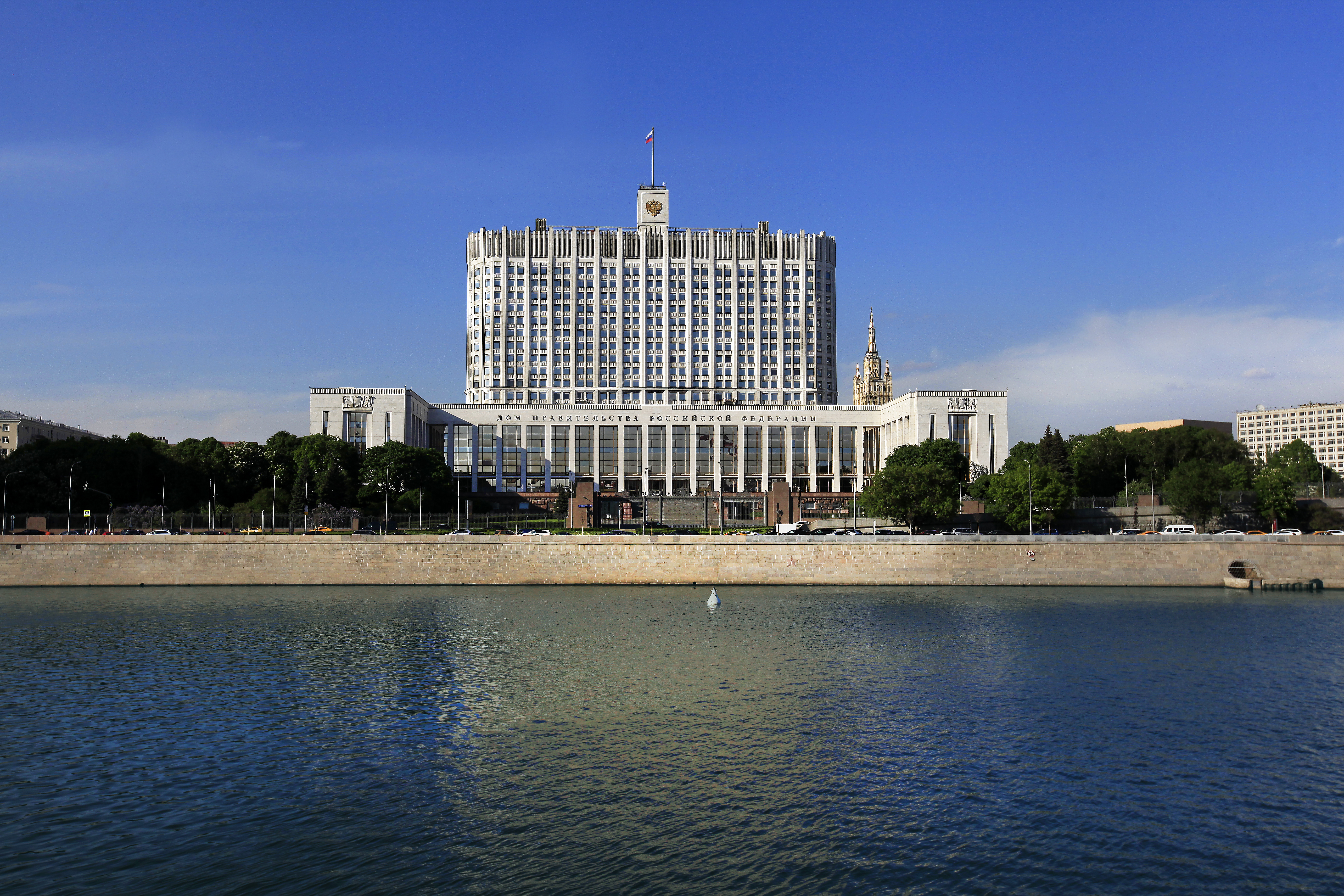 дом правительства РФ